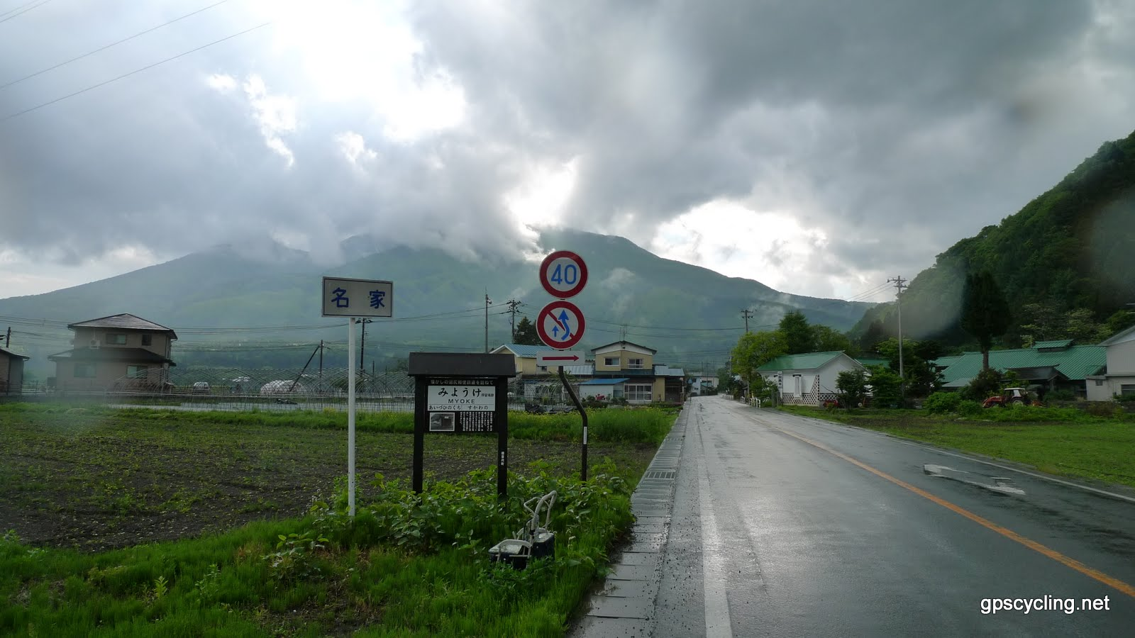 沼尻軽便鉄道名家駅跡